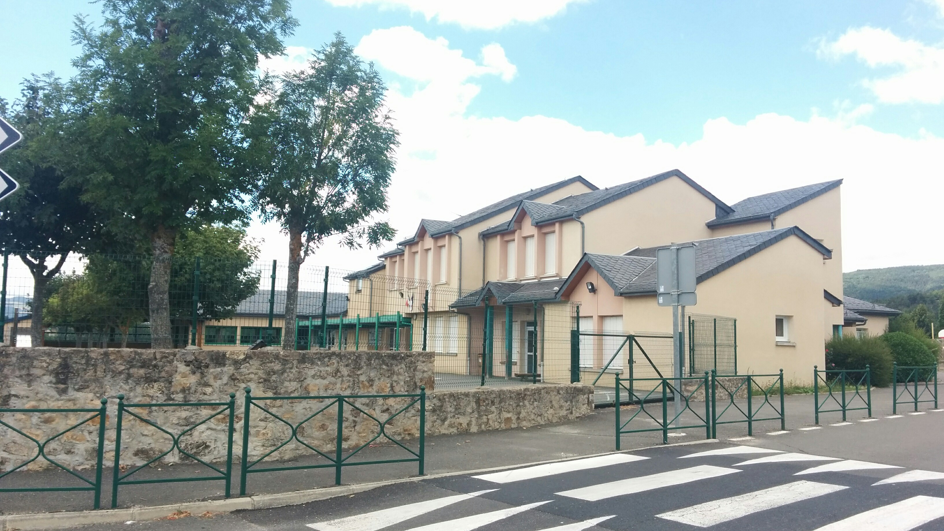 L'école ( primaire ) des Chazelles